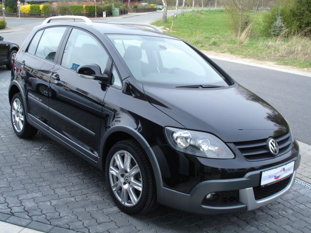 Volkswagen CrossGolf